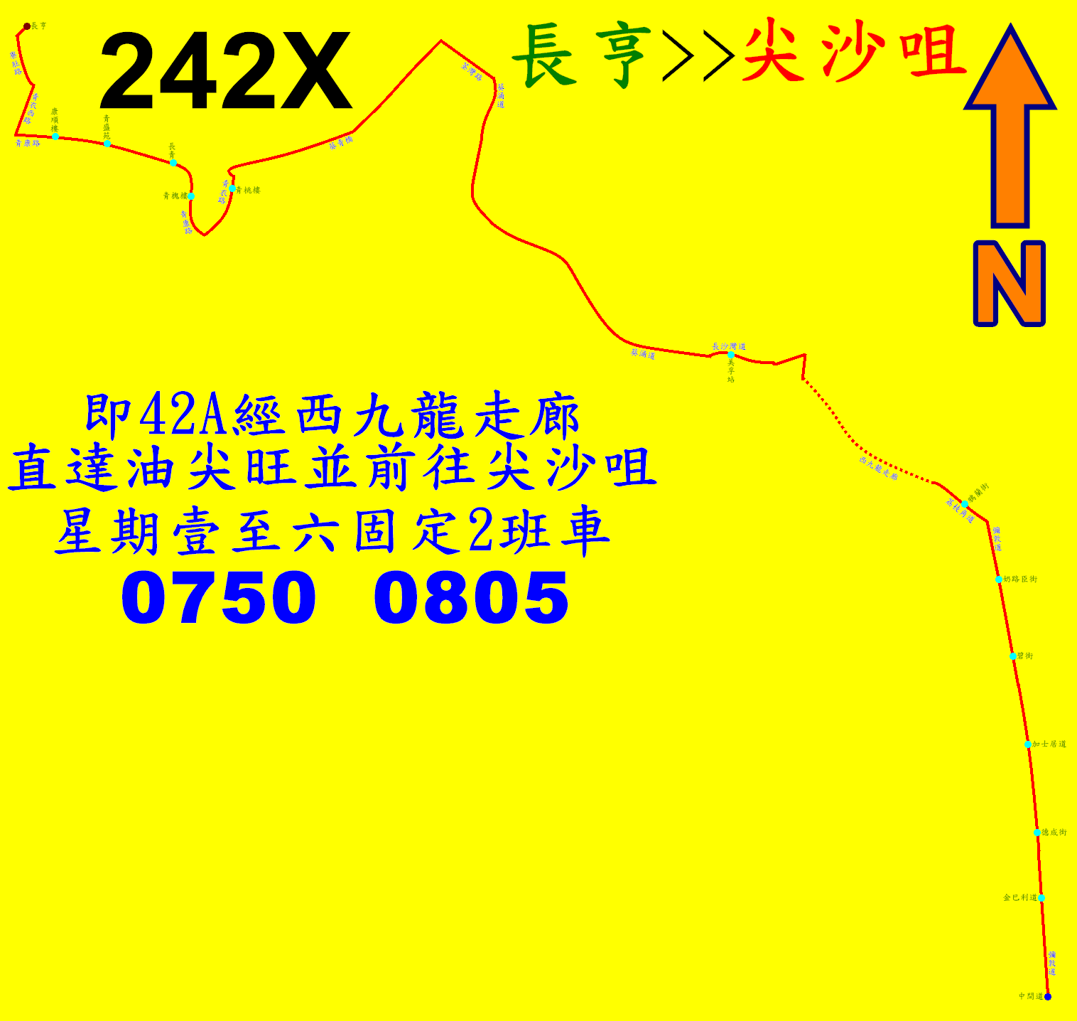 中文（香港）: 九巴242X線的走線圖